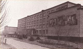 Новый учебный корпус 1975